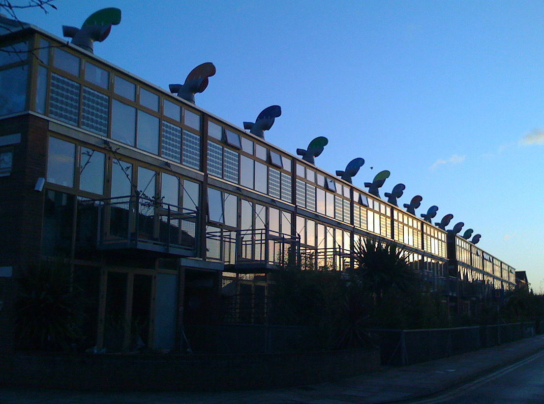 BedZed at dawn